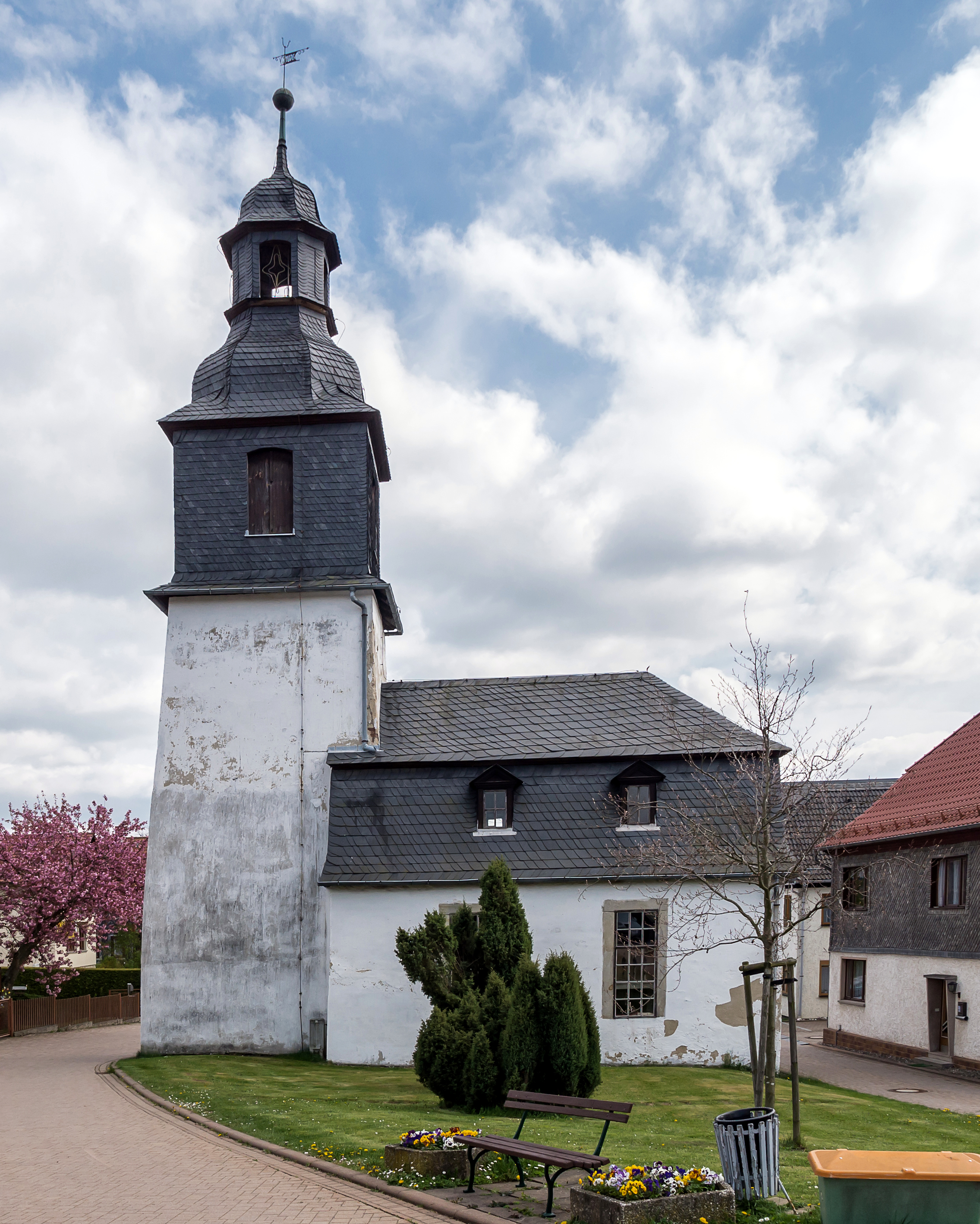 Denkmalgeschützte Kirche von Cordobang, Ortsteil von Bad Blanklenburg, Nordansicht